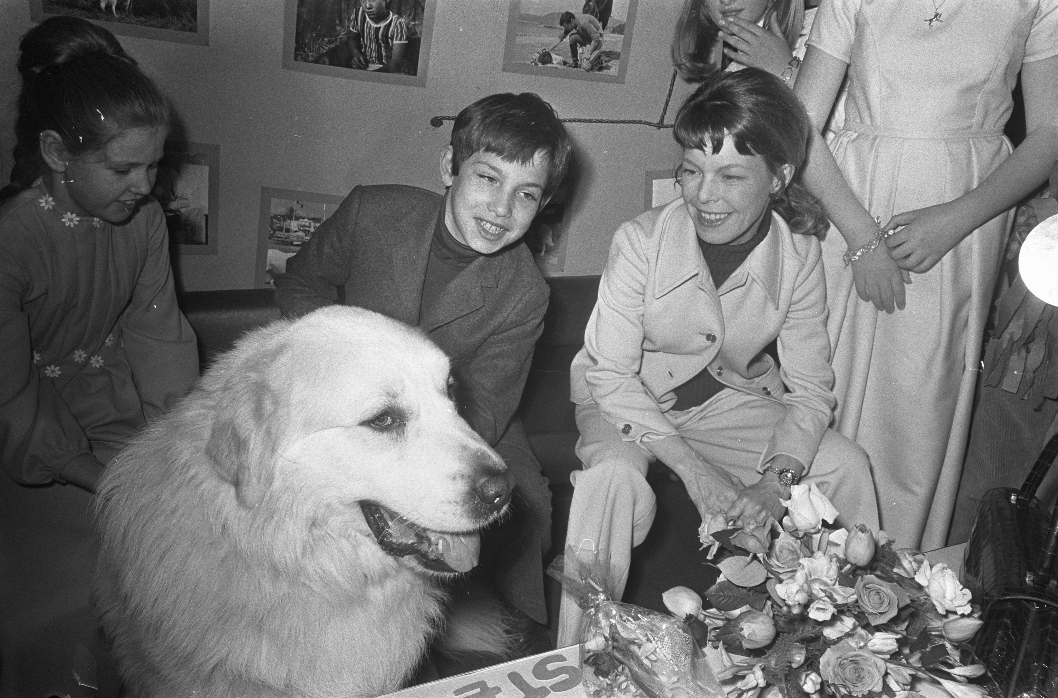 Collectie / Archief : Fotocollectie Anefo Reportage / Serie : [ onbekend ] Beschrijving : Premiere van de film "Sebastiaan vindt een vader" in Flora theater te Amsterdam. Mehdi El Glaoui en Cecile Aubry Datum : 2 april 1969 Locatie : Amsterdam, Noord-Holland Trefwoorden : auteurs, bioscopen, films, honden, premieres, schrijfsters, theaters, zangers Persoonsnaam : Aubry Cecile, Mehdi El Glaoui Instellingsnaam : Flora Fotograaf : Evers, Joost / Anefo Auteursrechthebbende : Nationaal Archief Materiaalsoort : Negatief (zwart/wit) Nummer archiefinventaris : bekijk toegang 2.24.01.05 Bestanddeelnummer : 922-2590